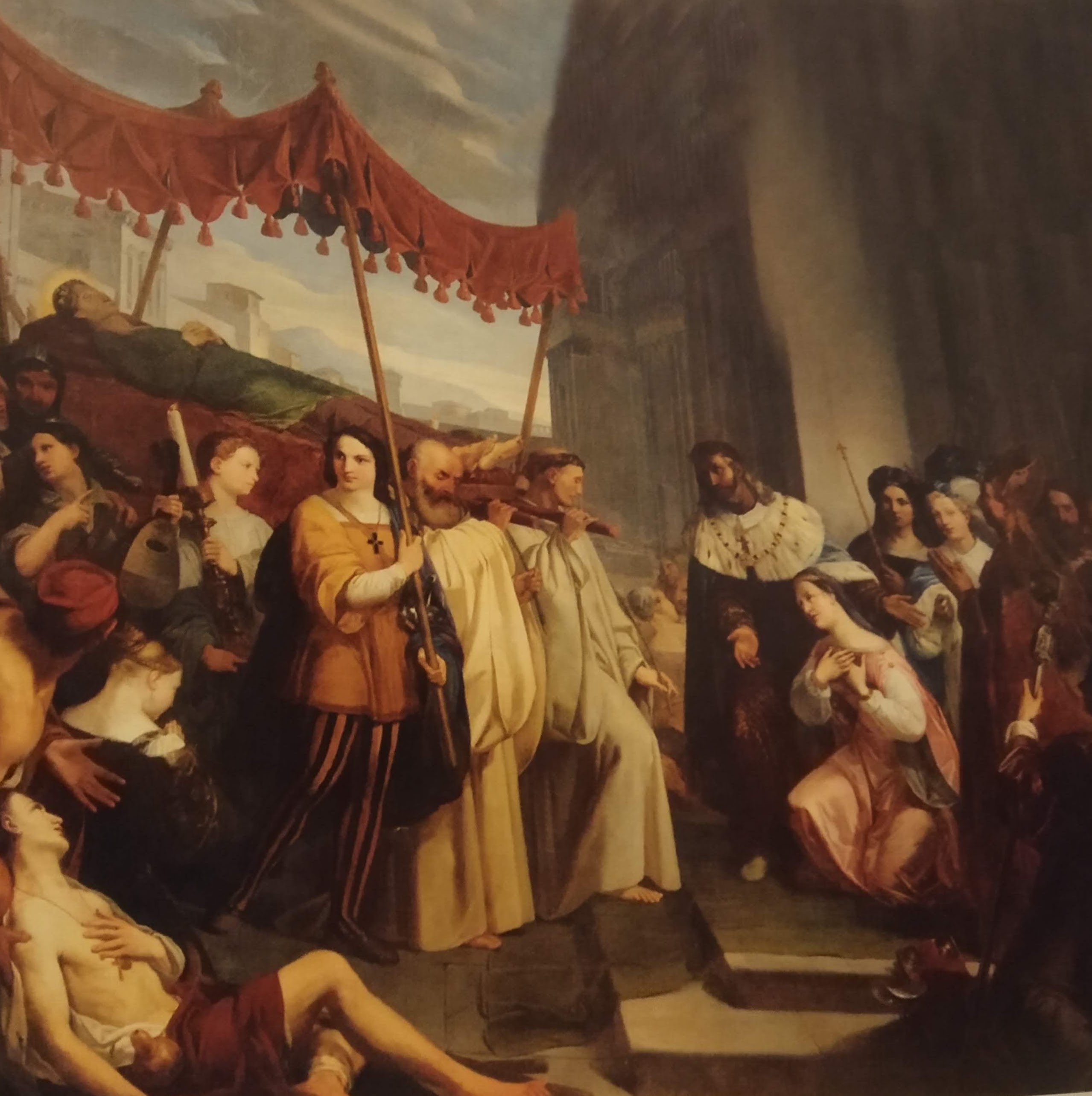 Traslazione del corpo di Santa Giulia a Brescia davanti a Desiderio e alla figlia Angelberga, conservato nel Duomo di Livorno.